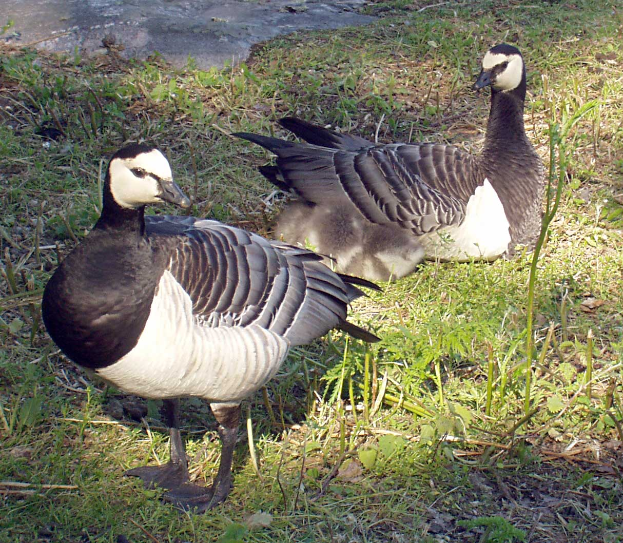 Weißwangengänse (Branta leucopsis)